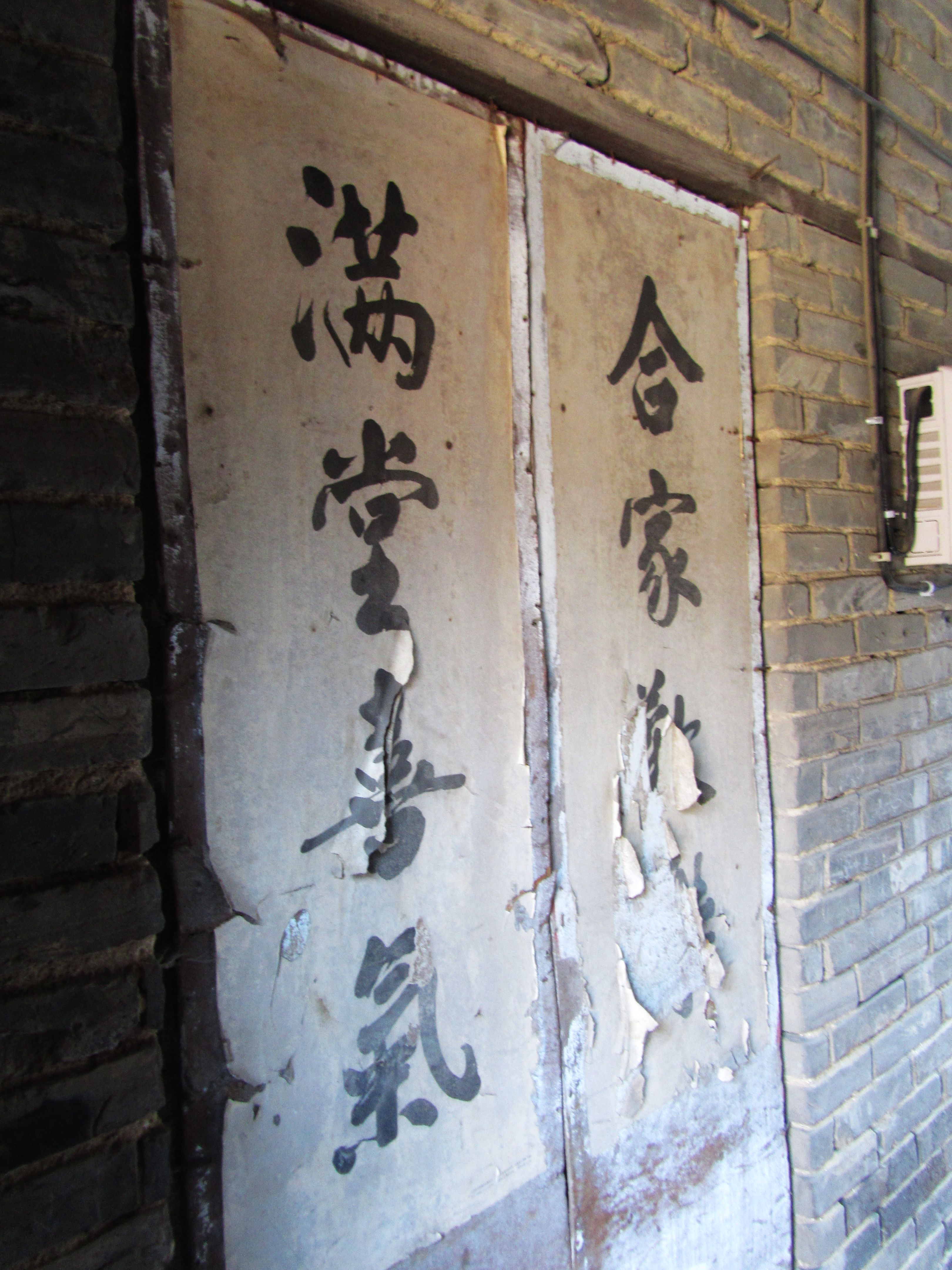 泰州徐家桥东巷许宅，门内对联。